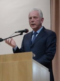 Heilbronns Oberbürgermeister Harry Mergel beim Frankenbacher Neujahrsempfang 2015 (Ausschnitt)